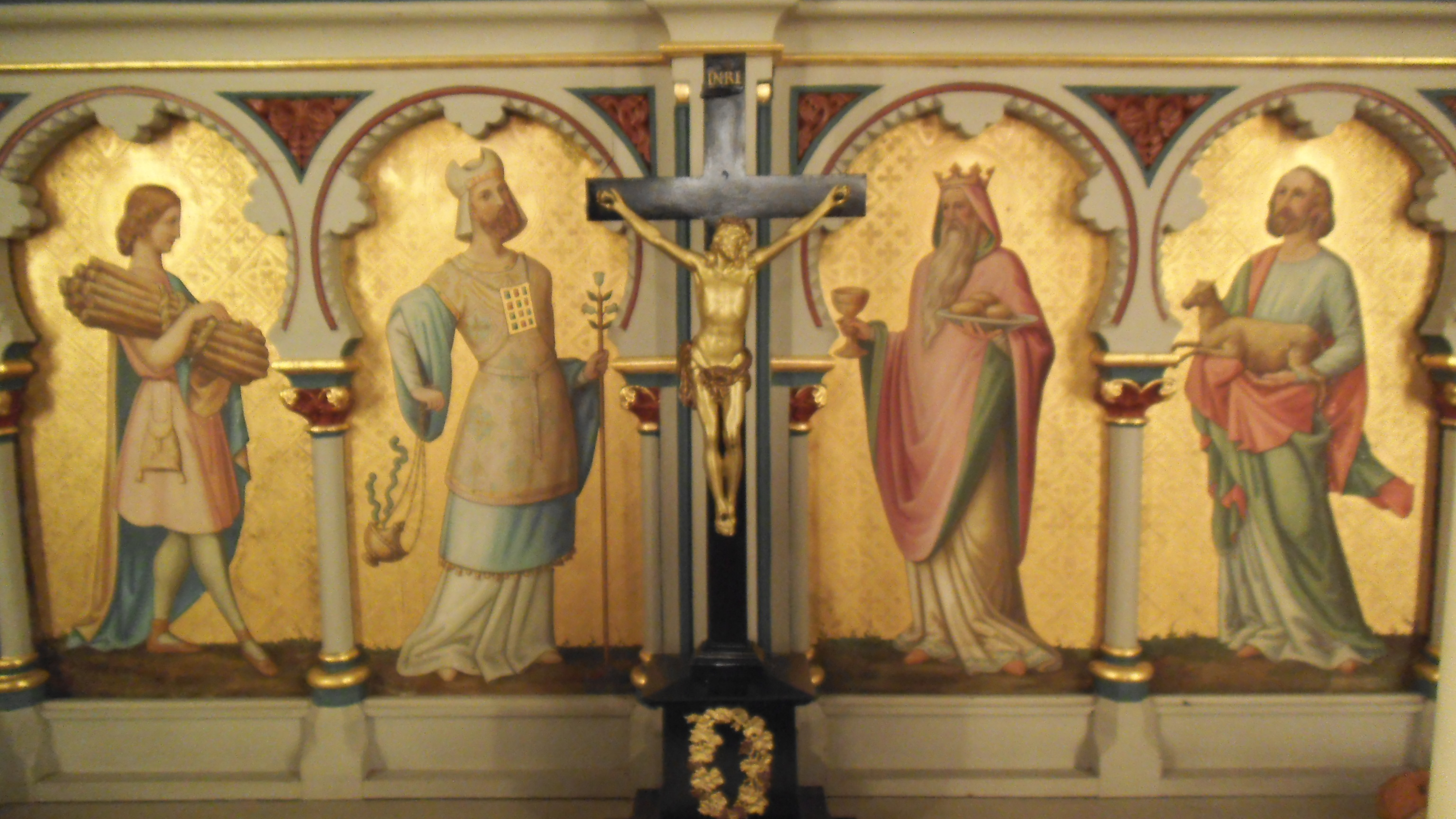 Altarbild.